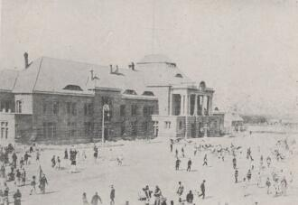 题名： 膠濟鐵路濟南車站：[照片] 文献来源： 《接收青岛纪念写真》 出版时间： 1924 年 卷期(页)： [ 4月 ，111页 ] 中图分类号： D265.7